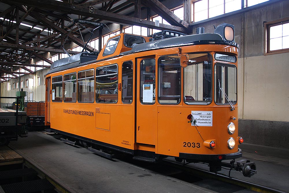 Fahrleitungsmeßwagen 2033 im ehem. Straßenbahnmuseum Zuffenhausen anläßlich des Meterspurabschieds in Stuttgart Zuffenhausen und Stammheim